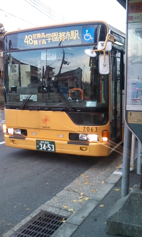 山陽バスの三菱ふそう車が48系統の運用に就いた様子。